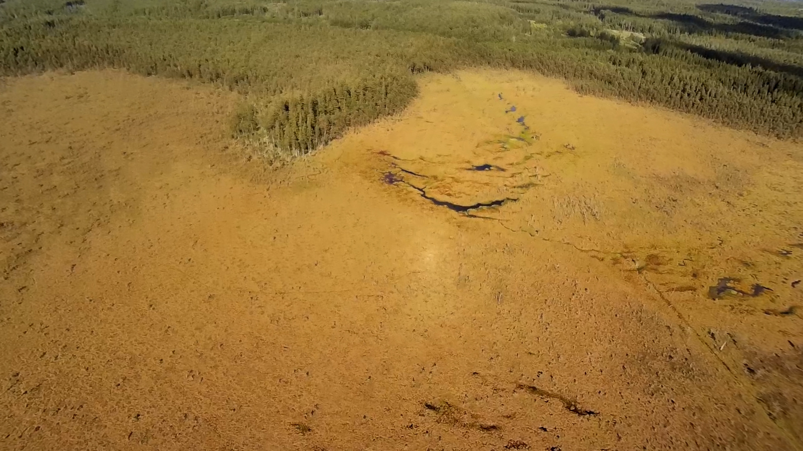 Aukštasis Tyras